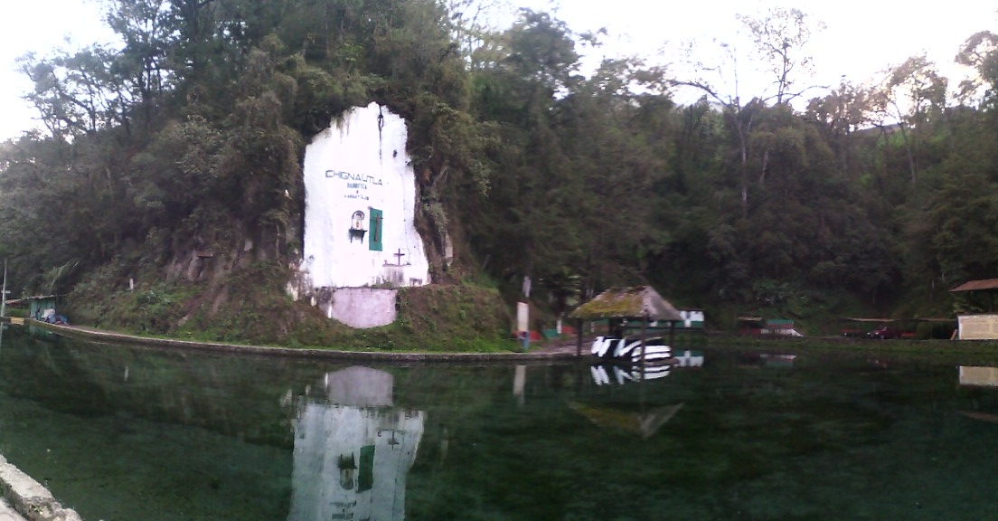 Este es el lago de los manantiales de Chignautla